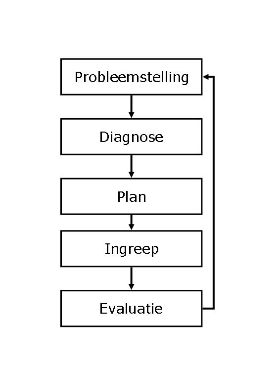 Schema van de regulatieve cyclus